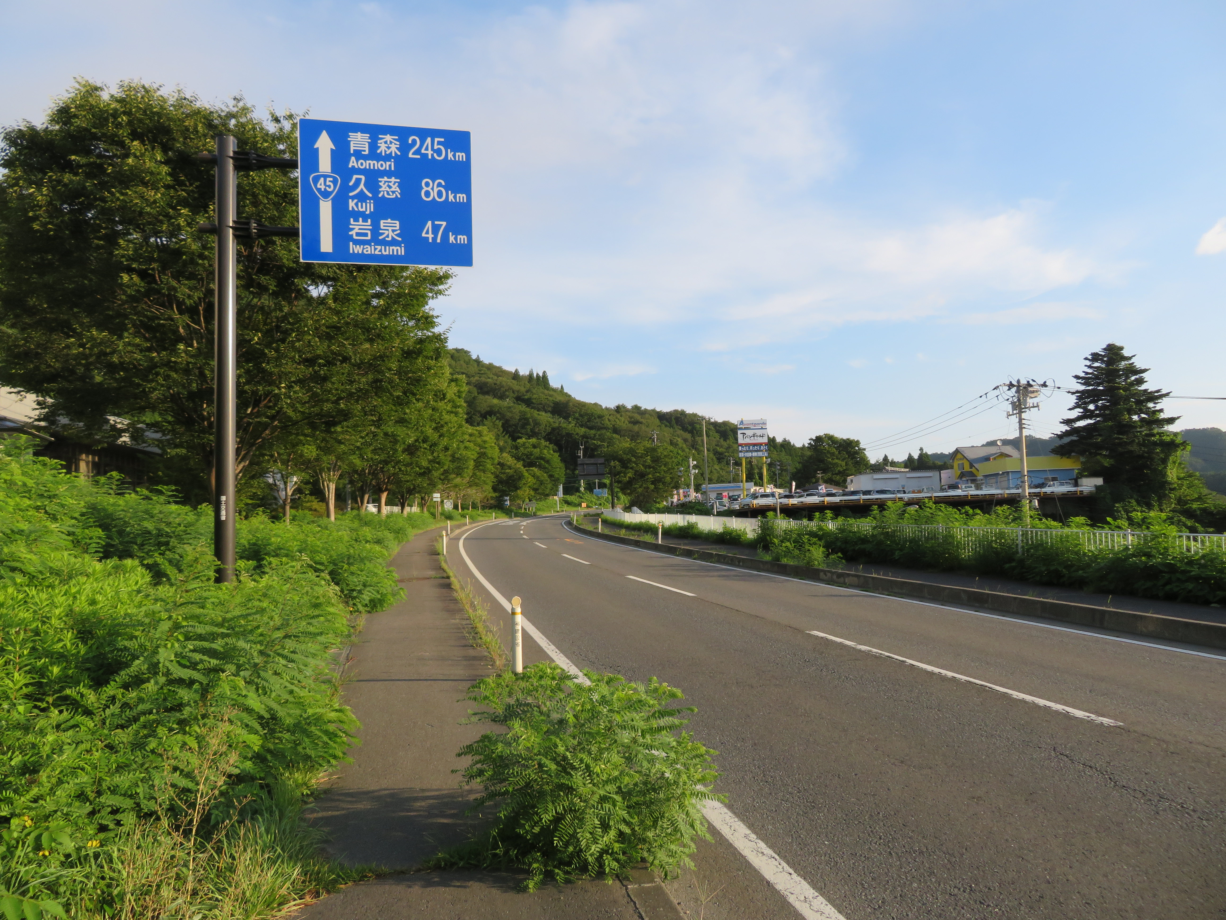 国道45号宮古北バイパス 岩手県宮古市崎鍬ヶ崎付近（田老方面を撮影）